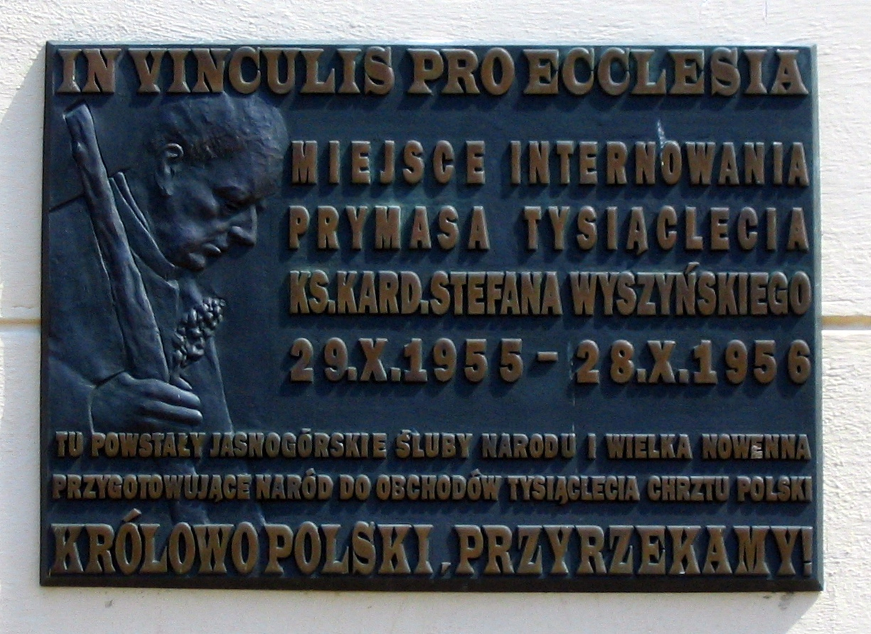 Pamiątkowa tablica na klasztorze nazaretanek w Komańczy